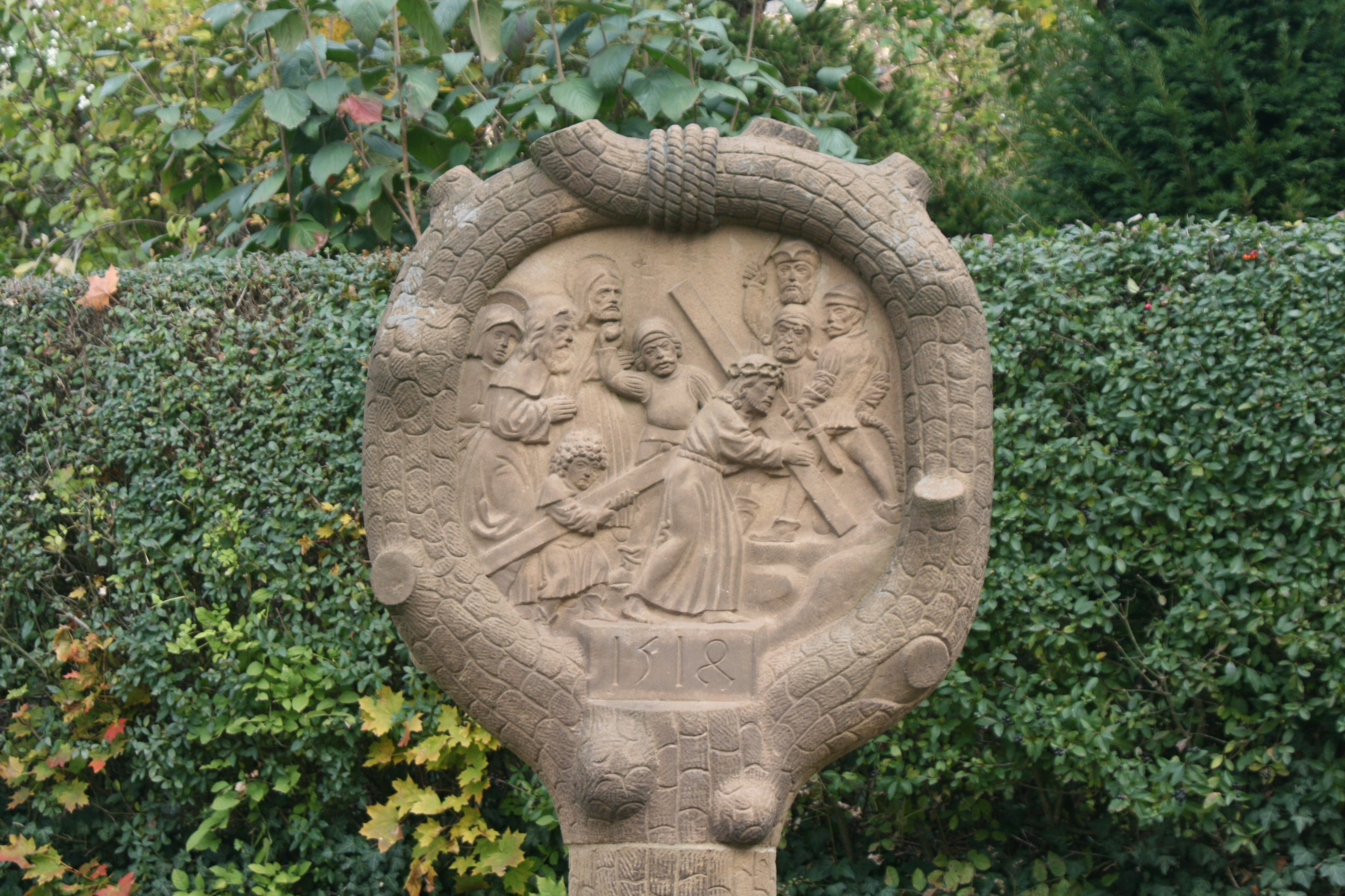 Bildstock an der Armsündersteige in Heilbronn. Kopie von Robert Gräßle[1] aus dem Jahr 1957. Das Original von 1514 stammt höchstwahrscheinlich von Hans Schweiner. ↑ see [1]